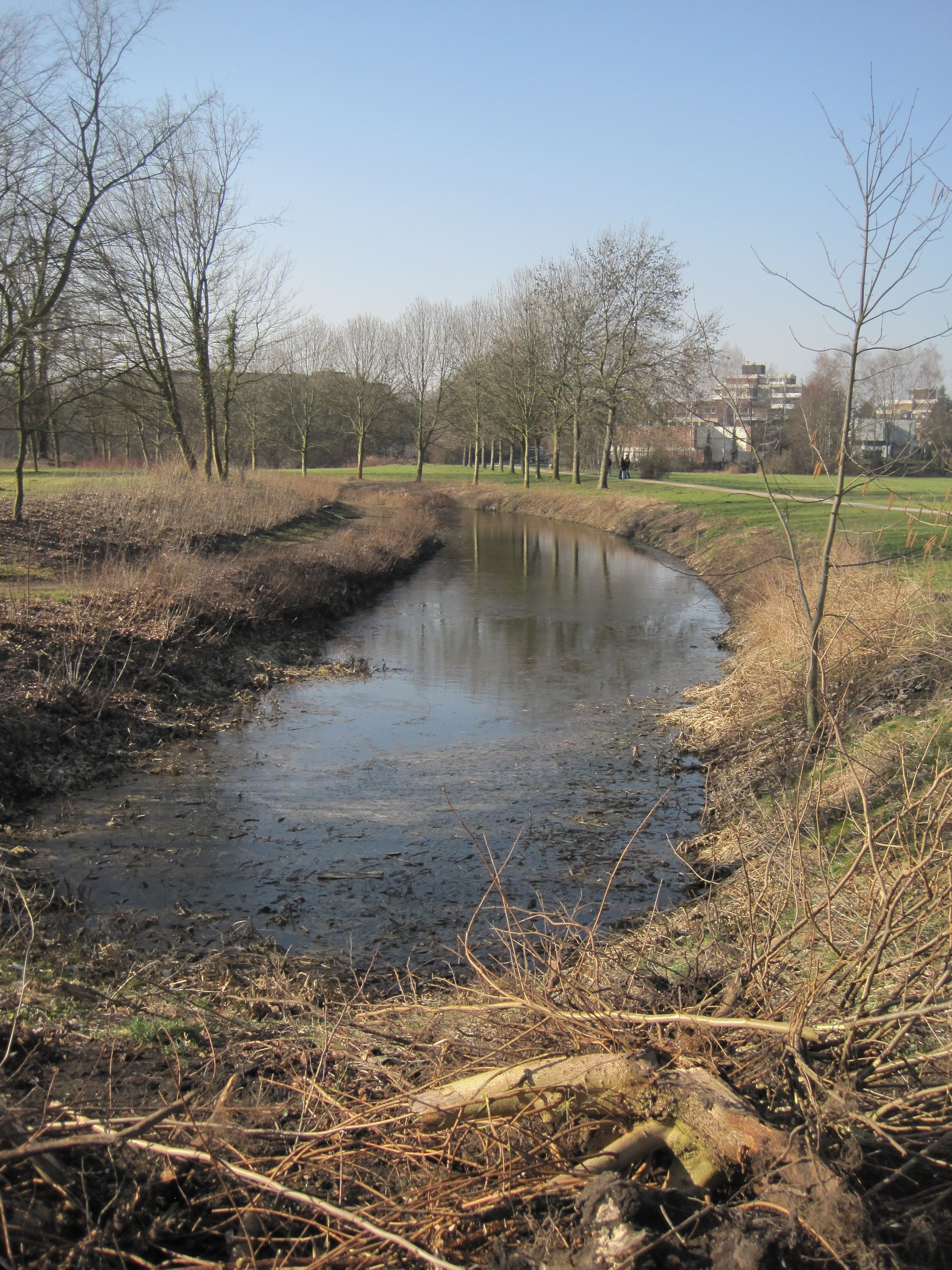 Das Foto zeigt die Außengräfte auf dem Burghügel Mark in Hamm.